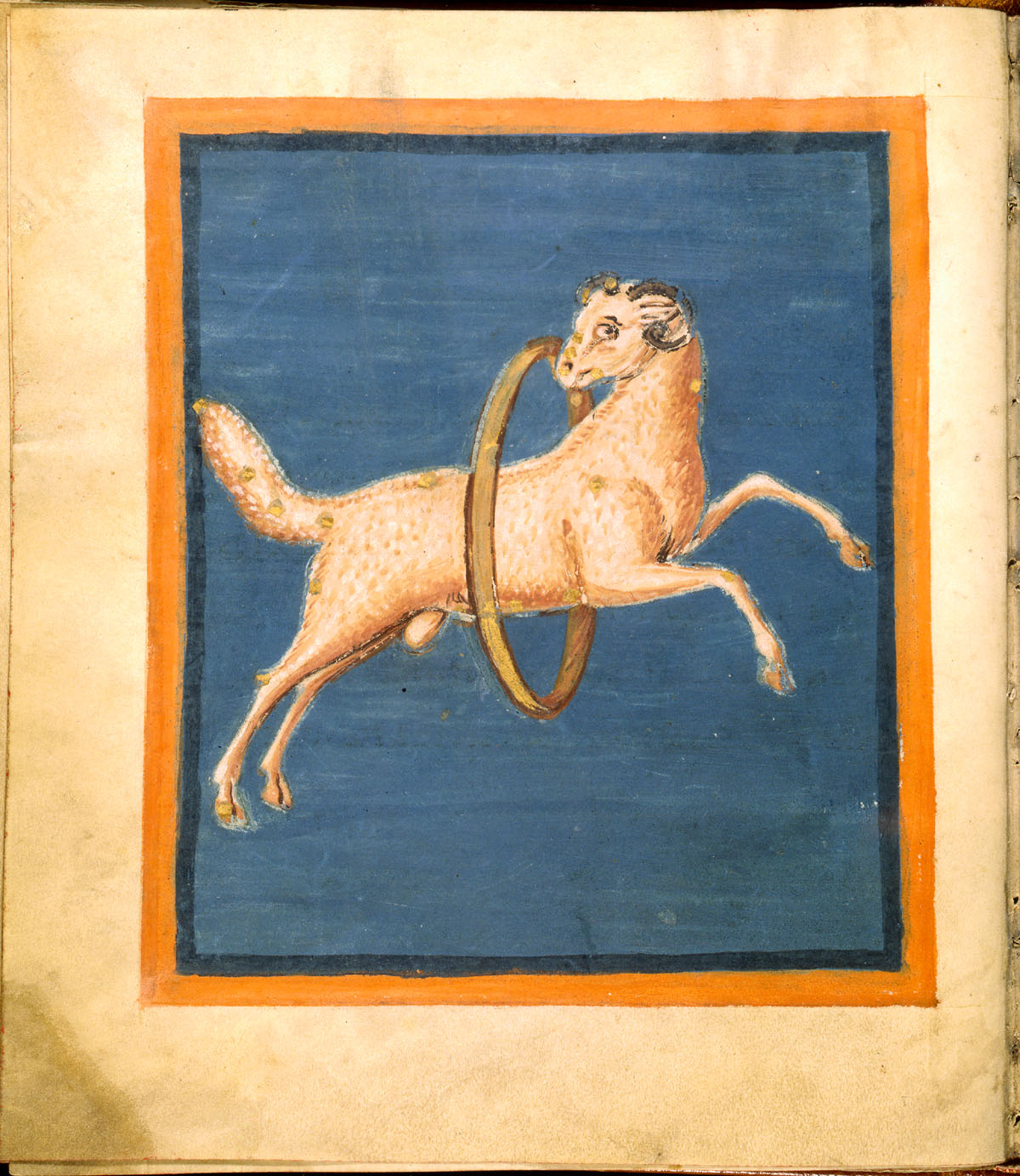 Fol. 34v Aries